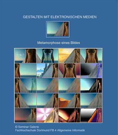 Erste InternetGallerie aus dem Jahre 2000, FB Allgemeine Informatik der FH Dortmund Seminar *GESTALTEN MIT ELEKTRONISCHEN MEDIEN* Ltg. Diplom Designer Josef H. Neumann